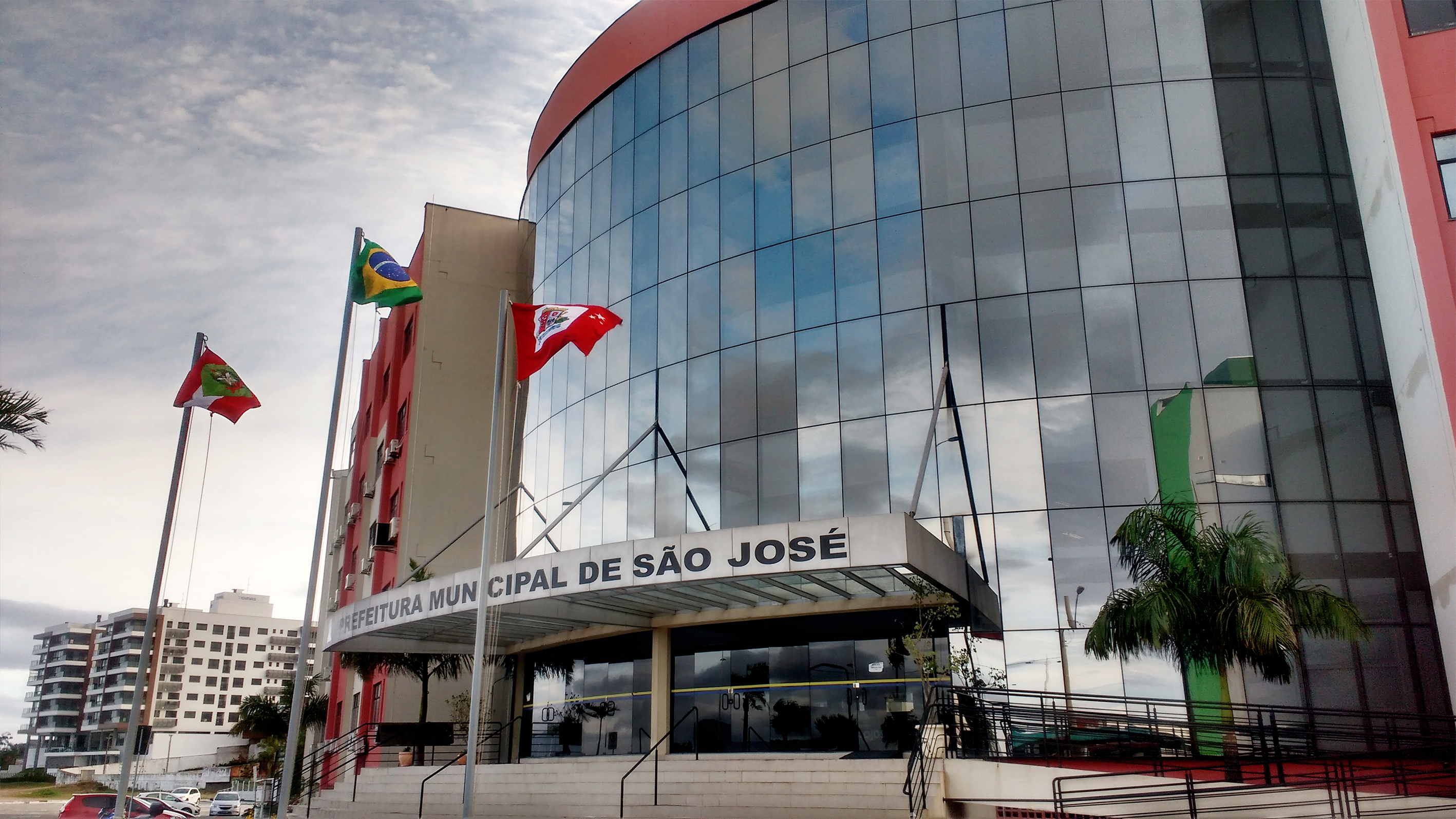 Prédio da Prefeitura Municipal de São José, na Beira-mar de São José, bairro Praia Comprida.